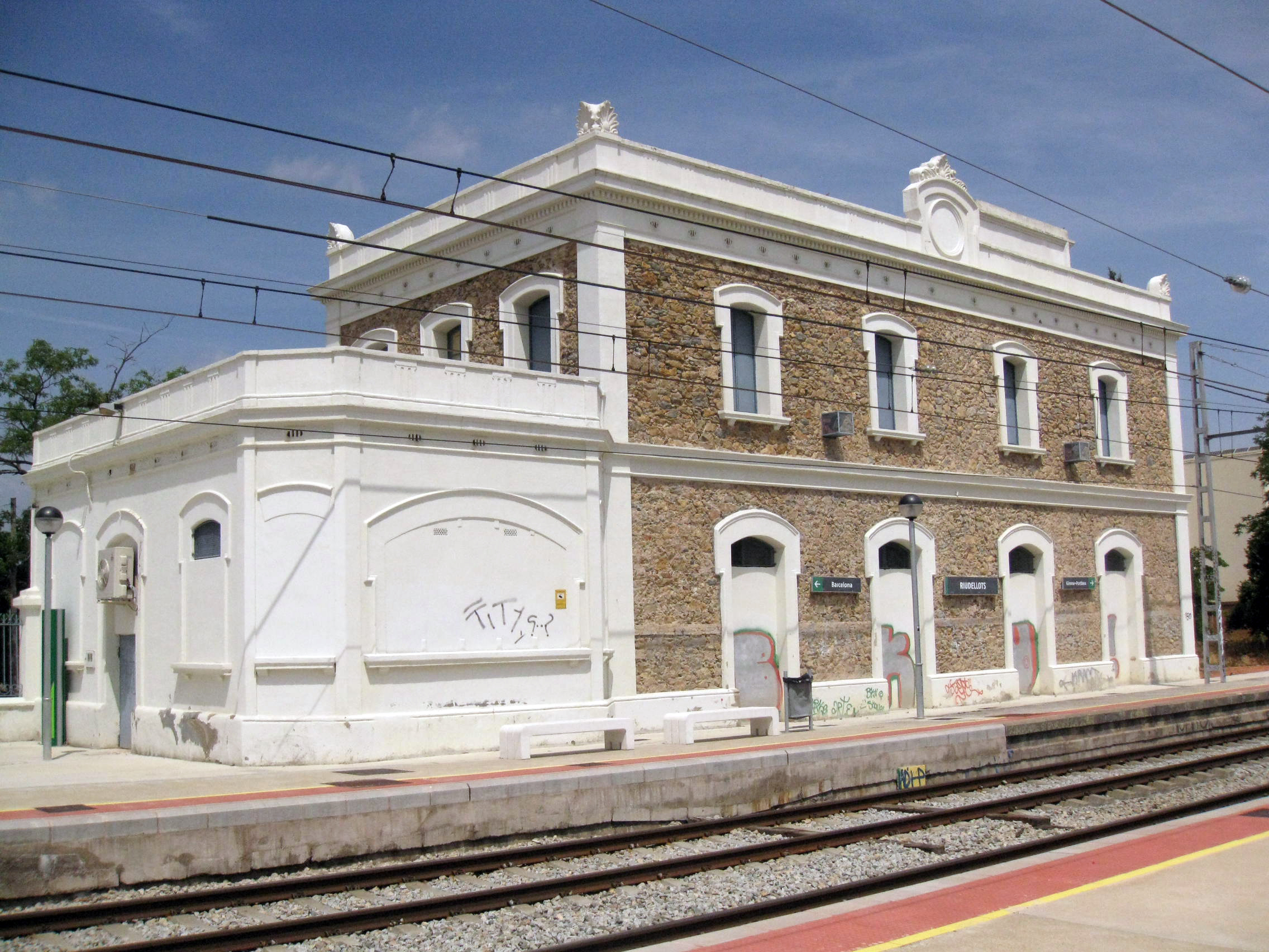 Estació de Riudellots (Riudellots de la Selva)